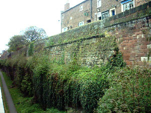 Murallas de Deva Victrix